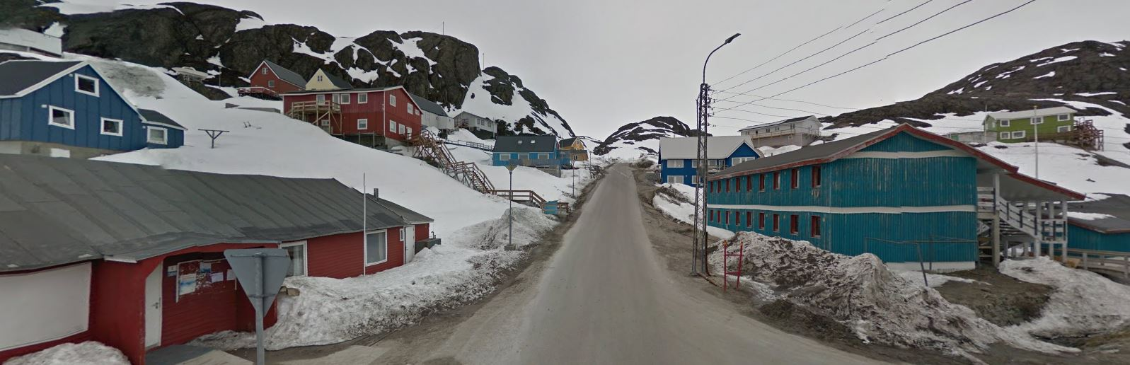 Maniitsoq